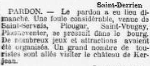 Le pardon de Saint-Derrien en 1906 (journal L'Ouest-Éclair du 12 juin 1906).